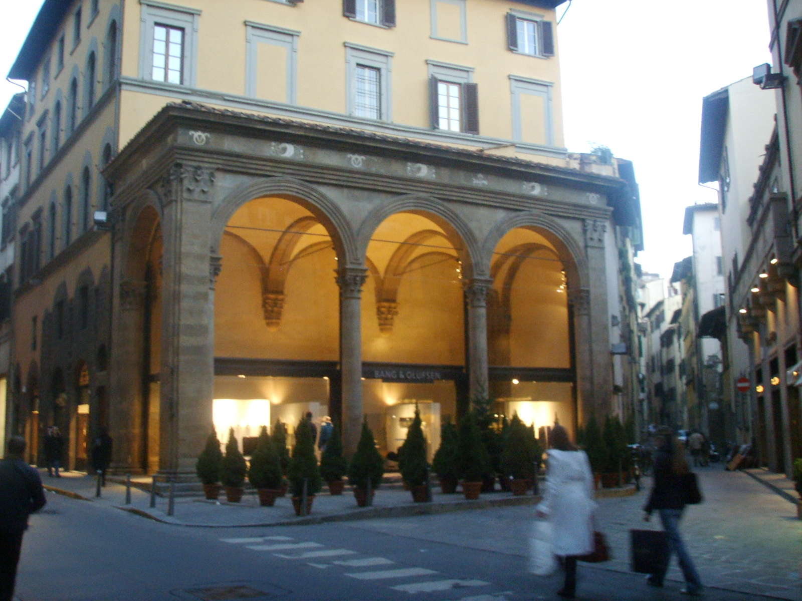 Rucellai Loggia in Florence, Italy